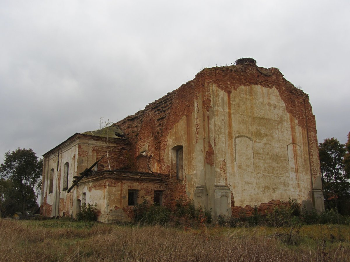 Грынявічы. Касцёл (царква) былога кляштара францысканцаў